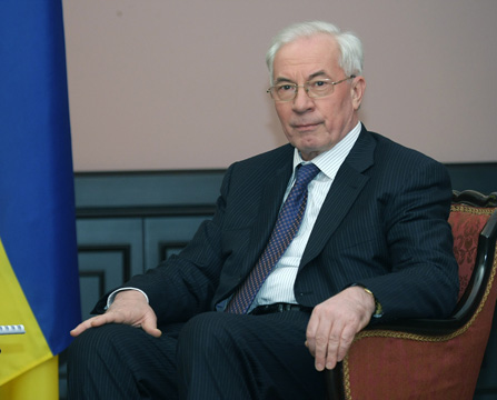 Премьер-министр Украины Н.Я.Азаров во время переговоров с Председателем Правительства Российской Федерации В.В.Путиным